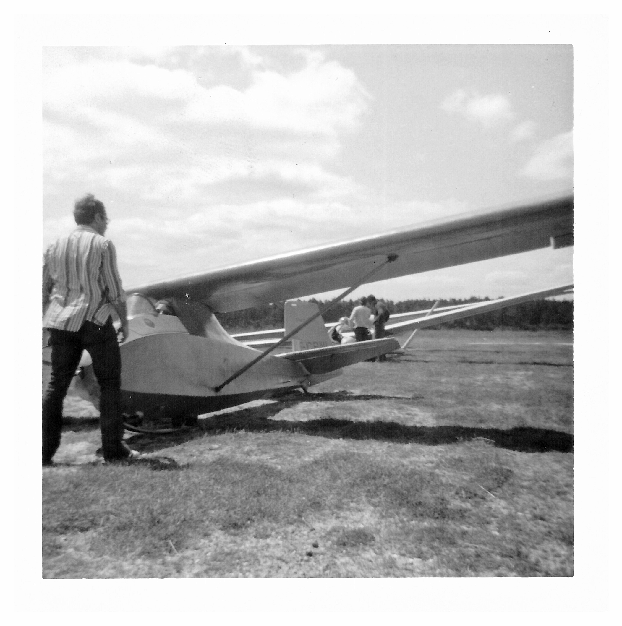 Nord 1300 F-CRNL sur le terrain de Bordeaux Saucats vers 1970 avec un Instamatic 100